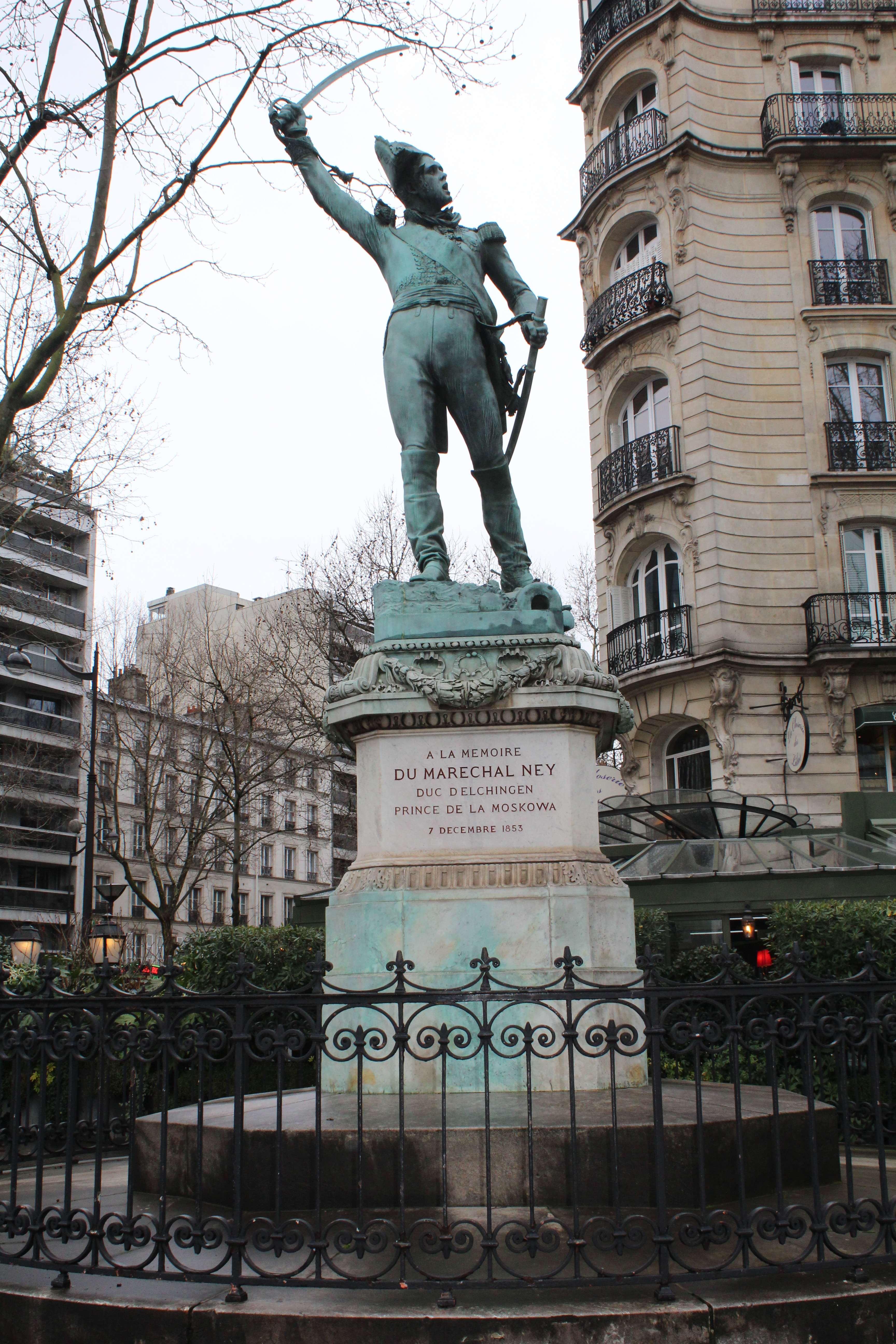 Statue du Maréchal Michel Ney par François Rude, Paris.